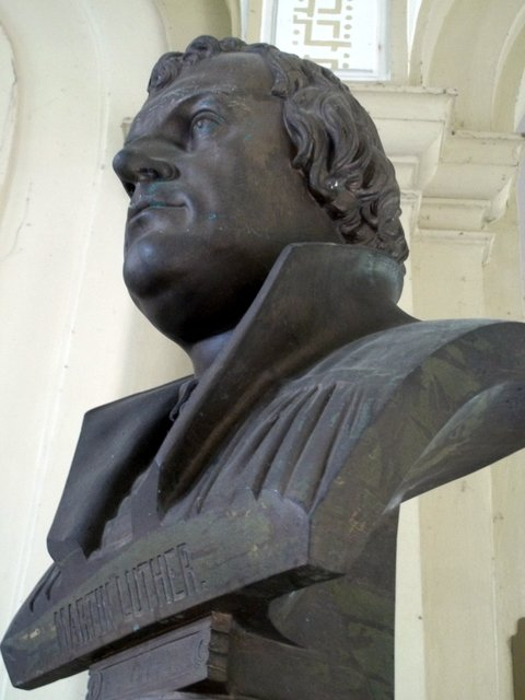 Ehren-Büste für Martin Luther im Gymnasium St. Augustin Grimma (Haupt-Eingang)